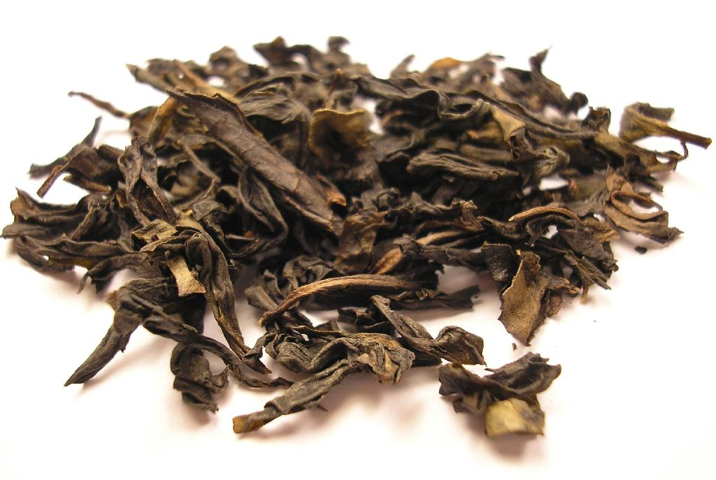 Ban Tian Yao tea